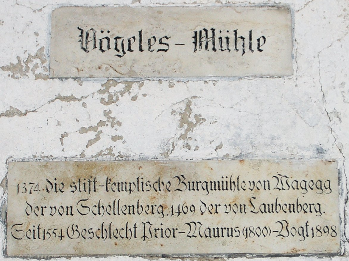 Inschrift an der Hauswand der Vögelesmühle